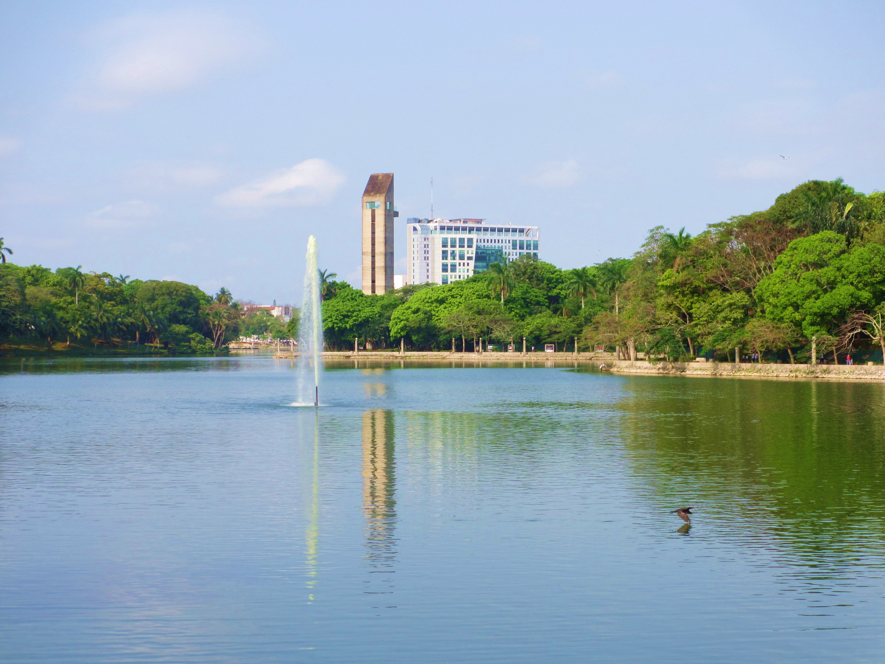 Vista de la laguna de las Ilusiones en la ciudad de Villahermosa, Tabasco, México.